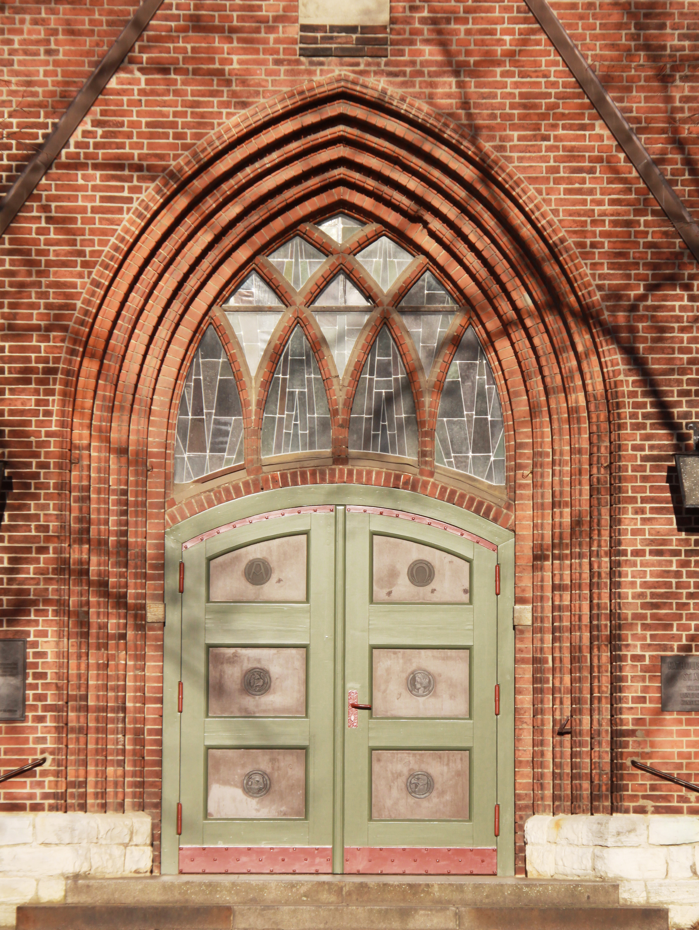 Katholische Kirche St. Antonius-Eingangsportal-Berlin-Oberschöneweide